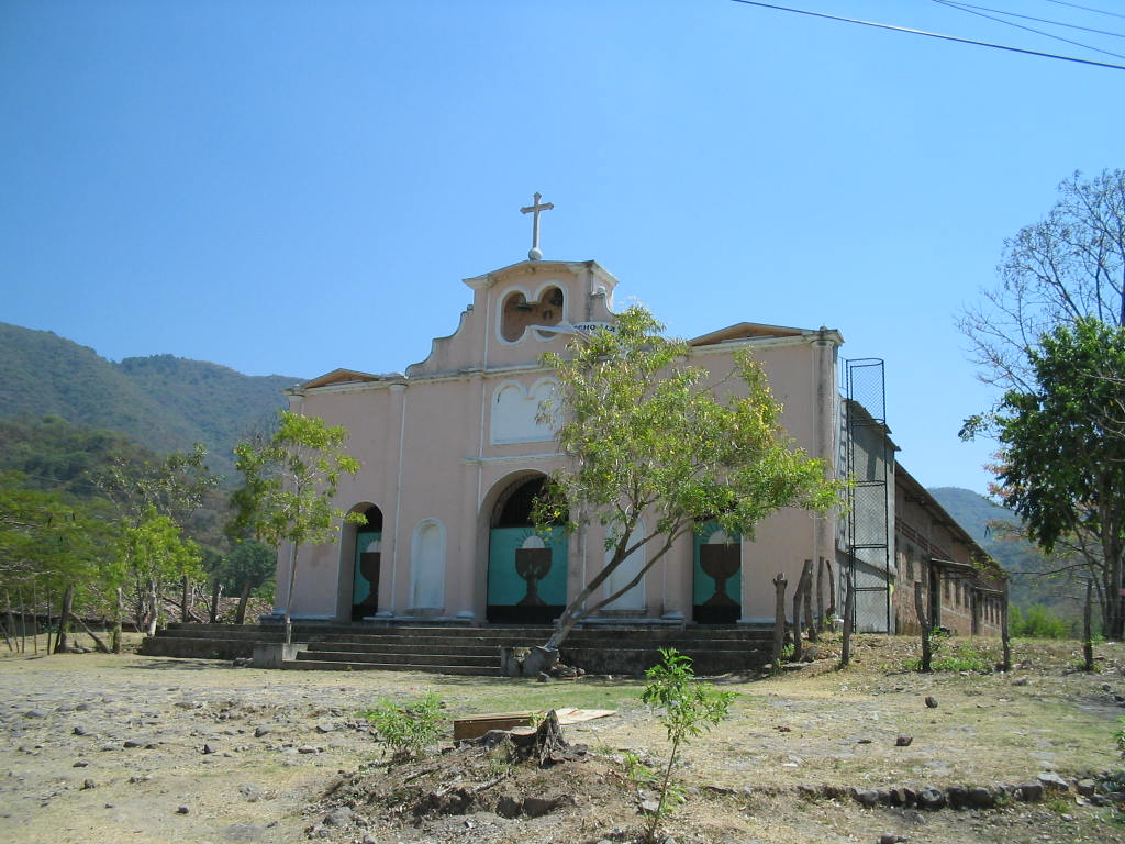 Es la Iglesia de ArcataoLa presente fotografia corresponde a la Iglesia Catolica de la Villa de Arcatao. La cual fue construida en el mismo lugar en donde estaba la antigua, la cual era solamente una fachada rudimentaria casi en ruinas hasta que fue bombardeada durante la guerra civil de los años 80's.